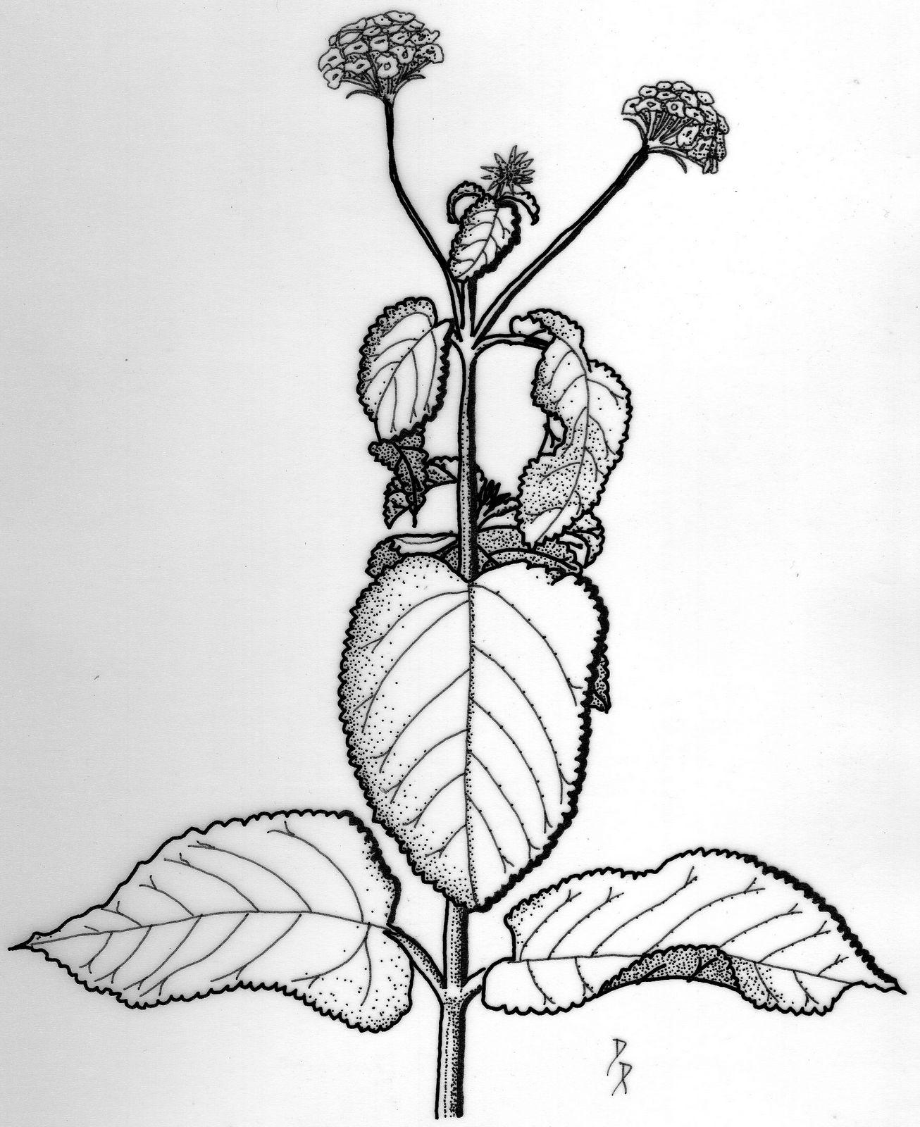 Ilustración de Lantana camara